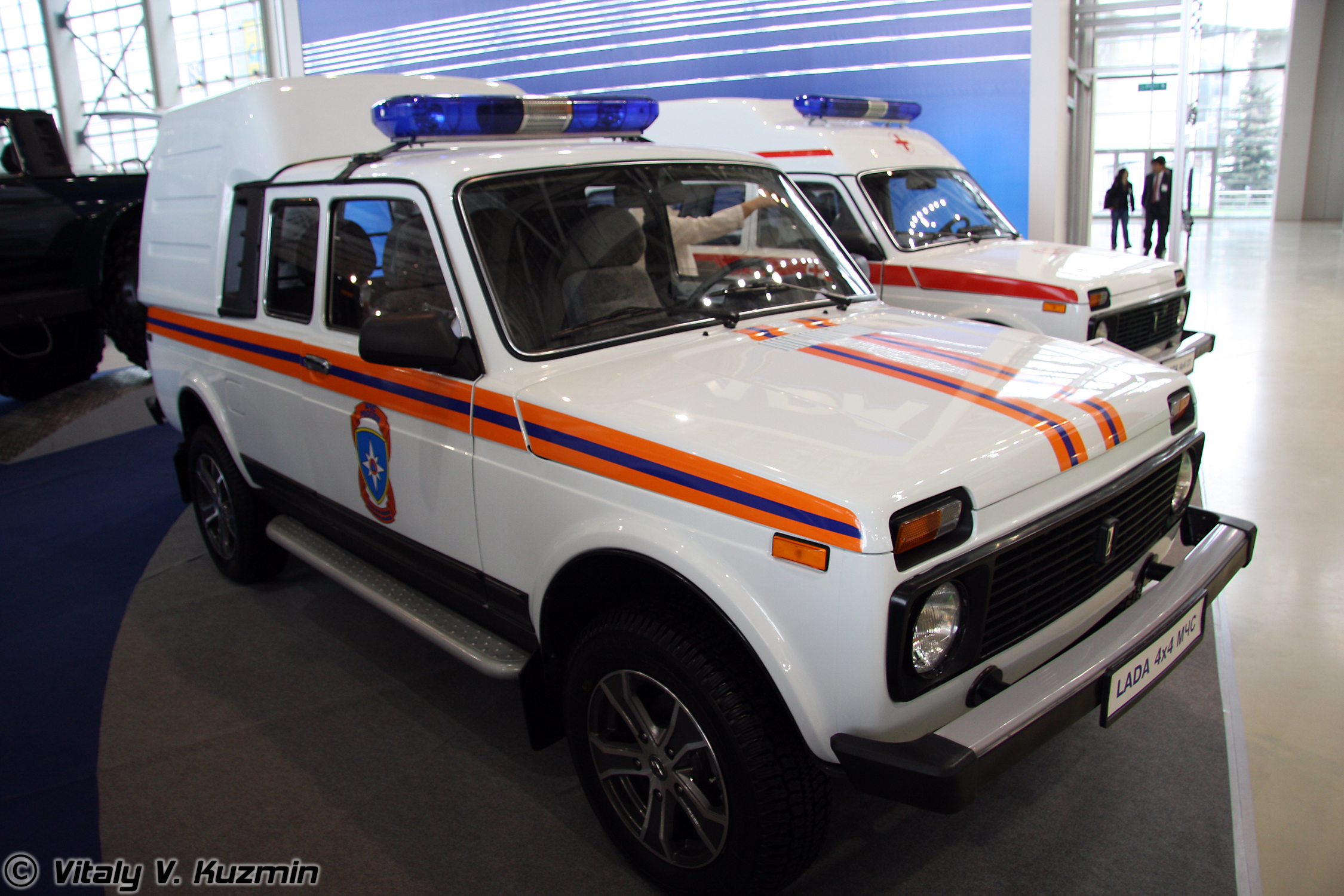 Lada 4x4 МЧС (Lada 4x4 Emercom mod)